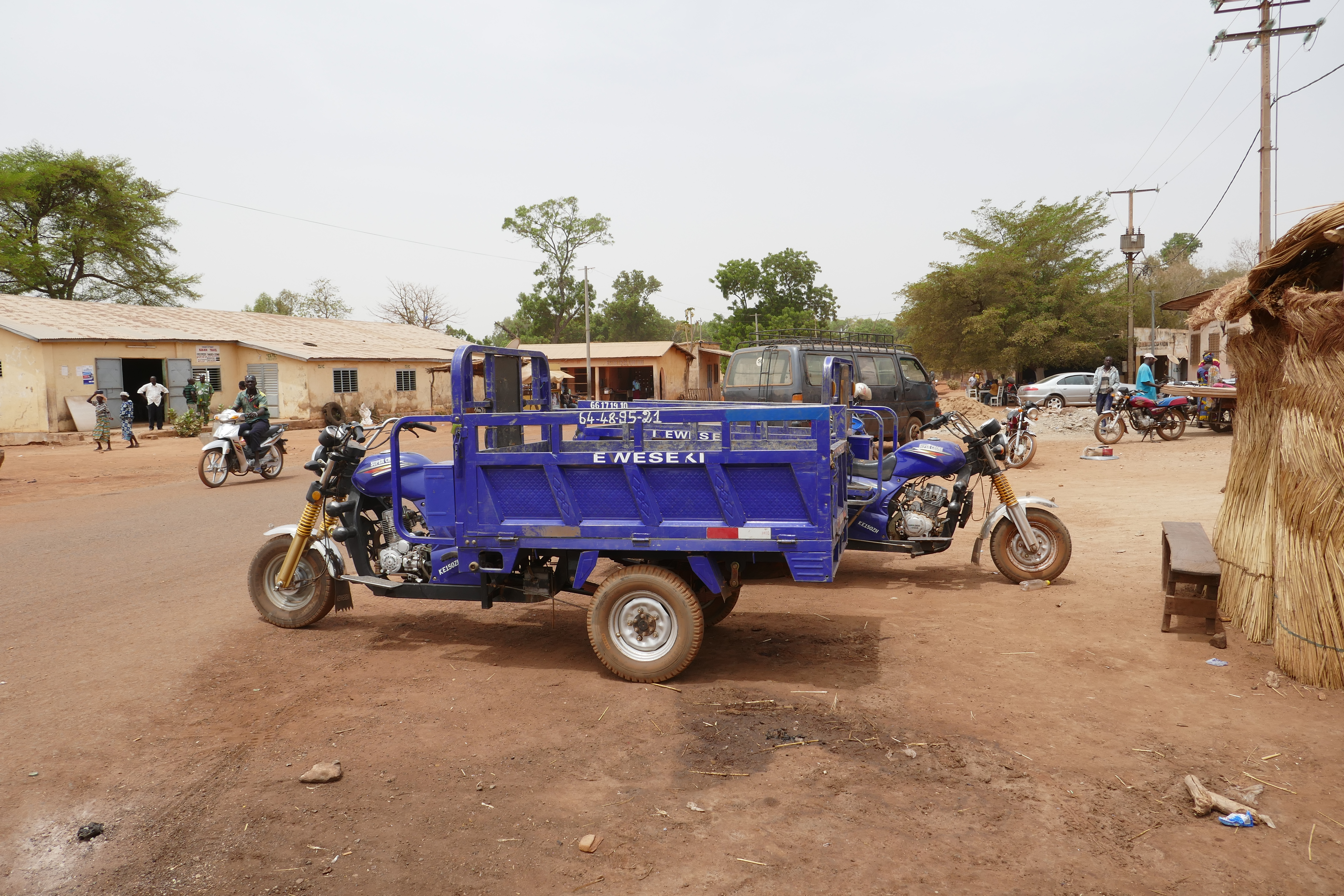 Véhicules à Tanguieta (Bénin).